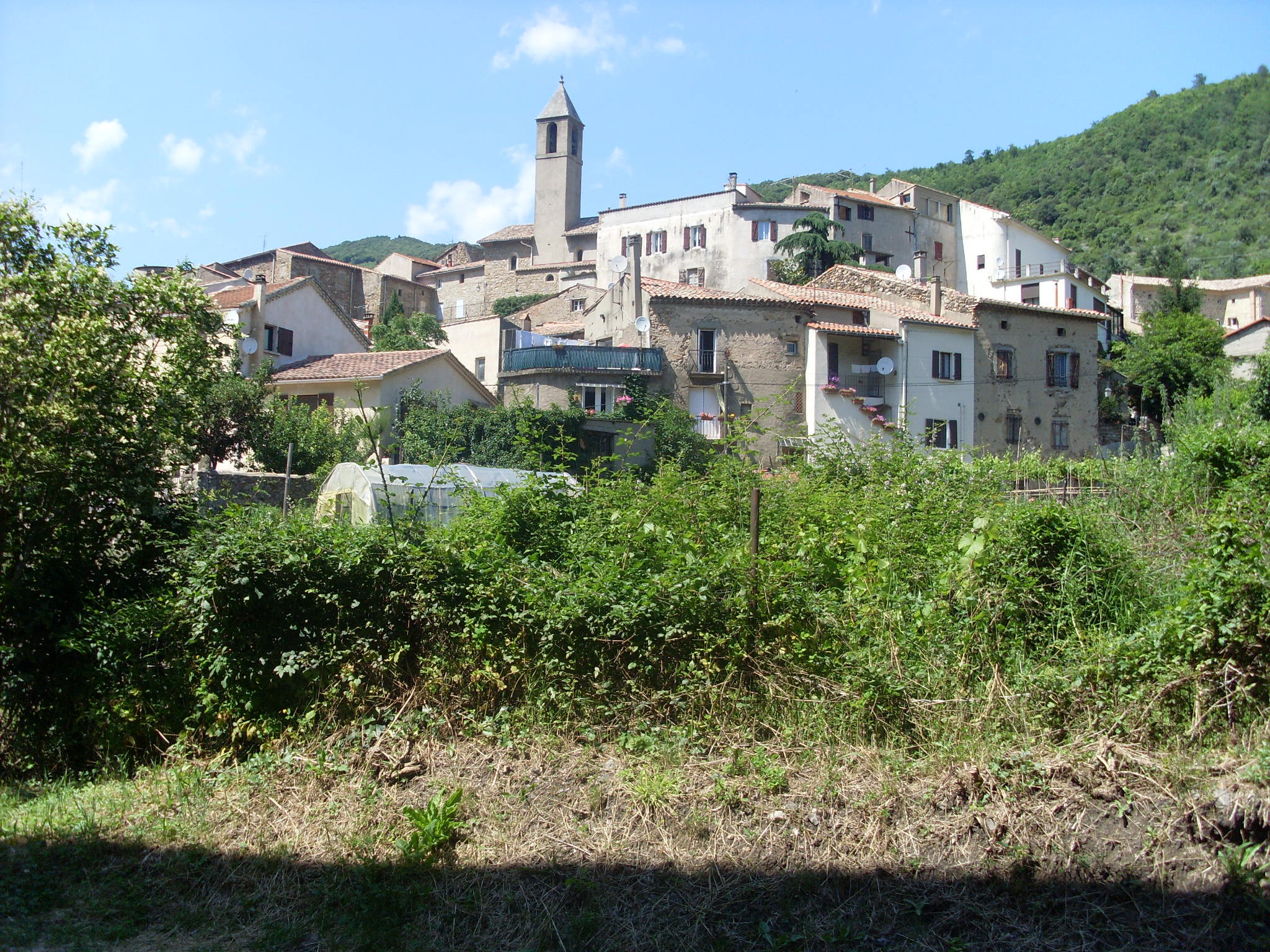 Vue générale